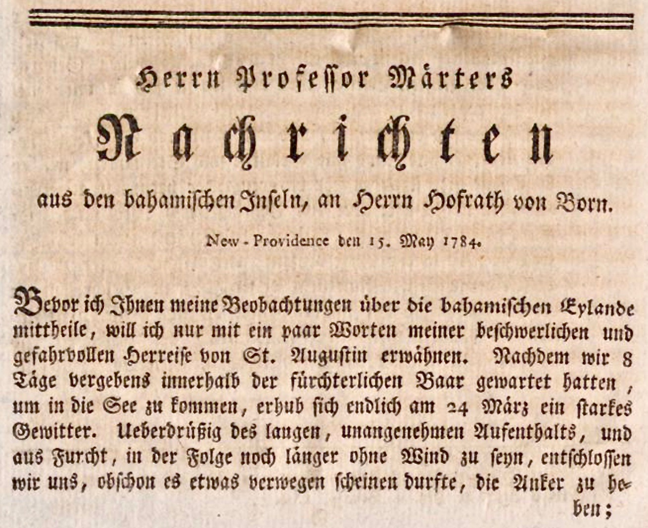 Beginn des Berichts, den der von Kaiser Joseph II. nach Amerika entsandte Botaniker Dr. med. Franz Joseph Märter (1753–1827) über seinen Aufenthalt auf den Bahamas im Jahre 1784 veröffentlichte. Aus Ignaz Edler von Born (Hrsg.): Physikalische Arbeiten der einträchtigen Freunde in Wien, 2. Jahrgang, 1. Quartal, 1786, S. 58.